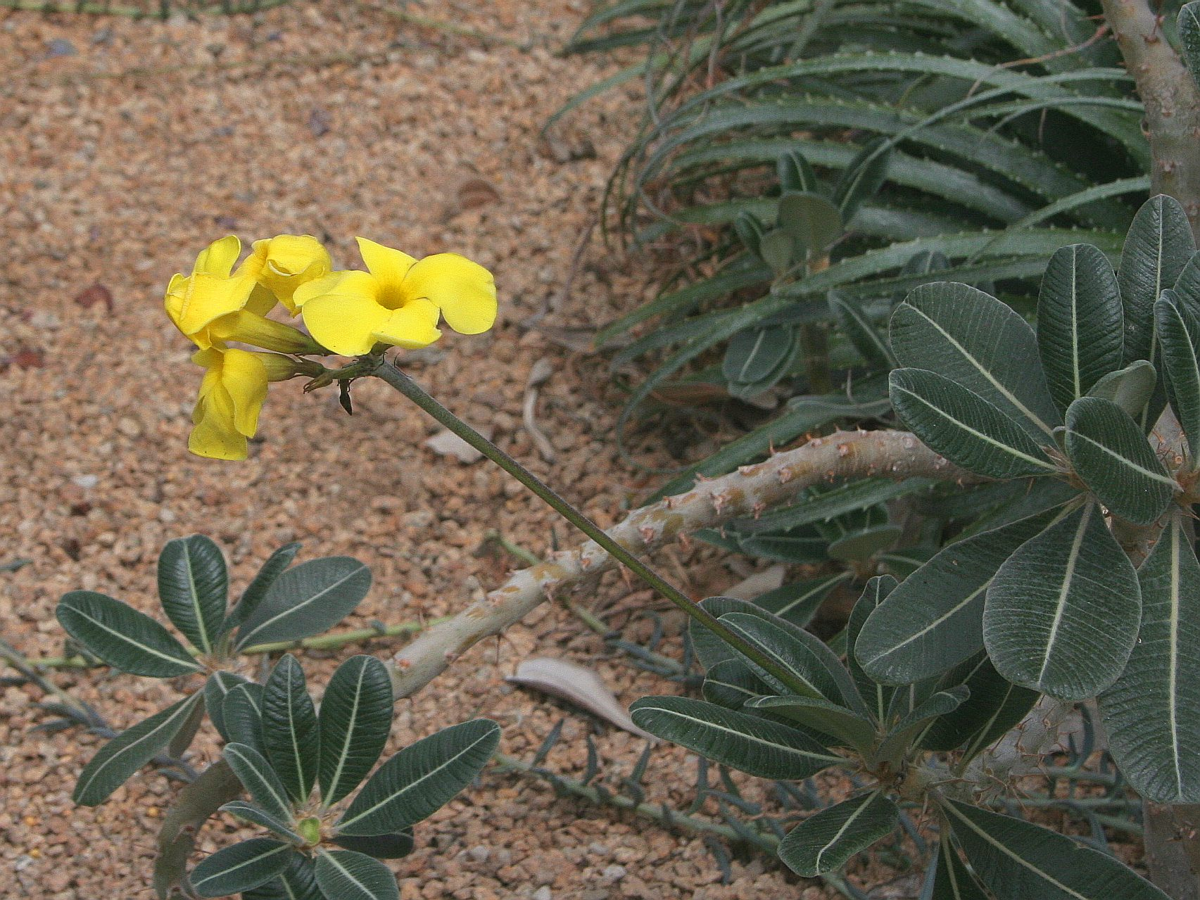 Pachypodium rosulatum, Conservatoire botanique national de Brest, France, juin 2007